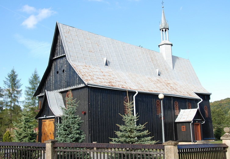 drewniany kościół par. p.w. śś. Szymona i Judy, XV/XVI w. Pogwizdów, Bochnia (gmina wiejska)